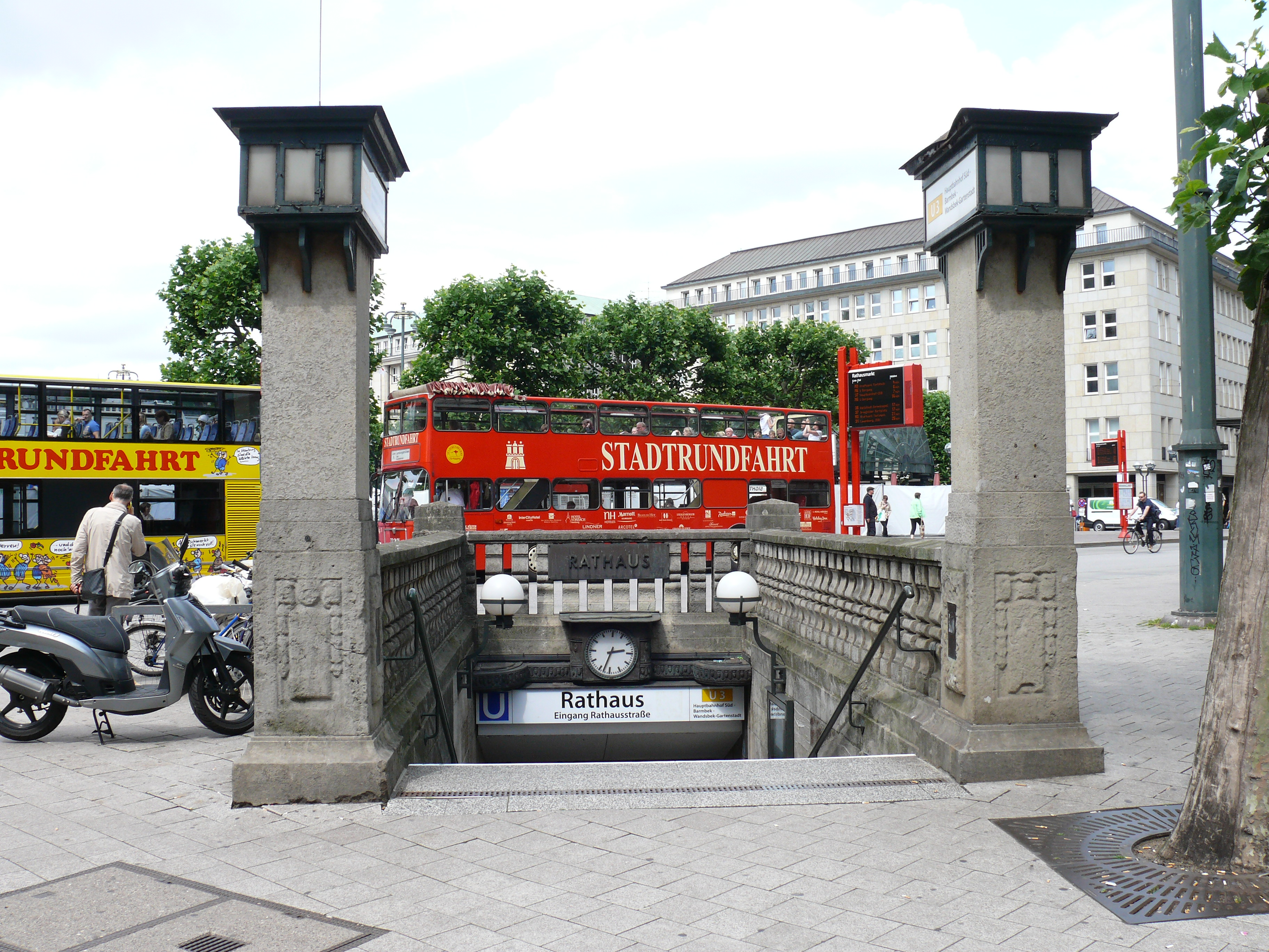 Zugang "Rathausstraße" an der Oberfläche am U-Bahnhof Rathaus in Hamburg.